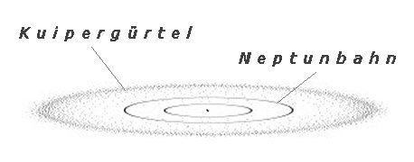 Kuiper-Gürtel, Schema